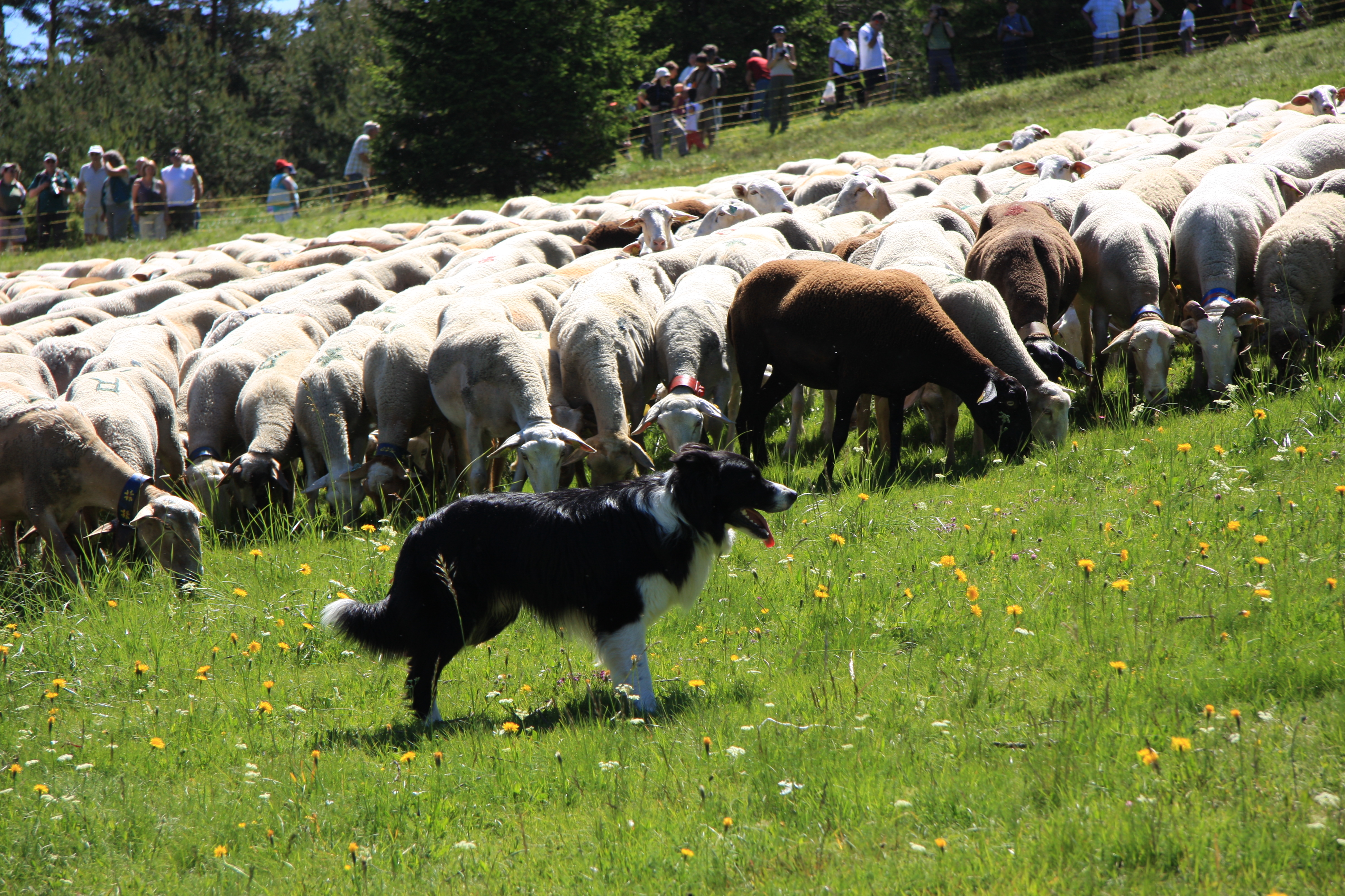 Fête de la transhumance le 13 juin 2009 à l'Espérou, commune de Valleraugue (Gard, France)